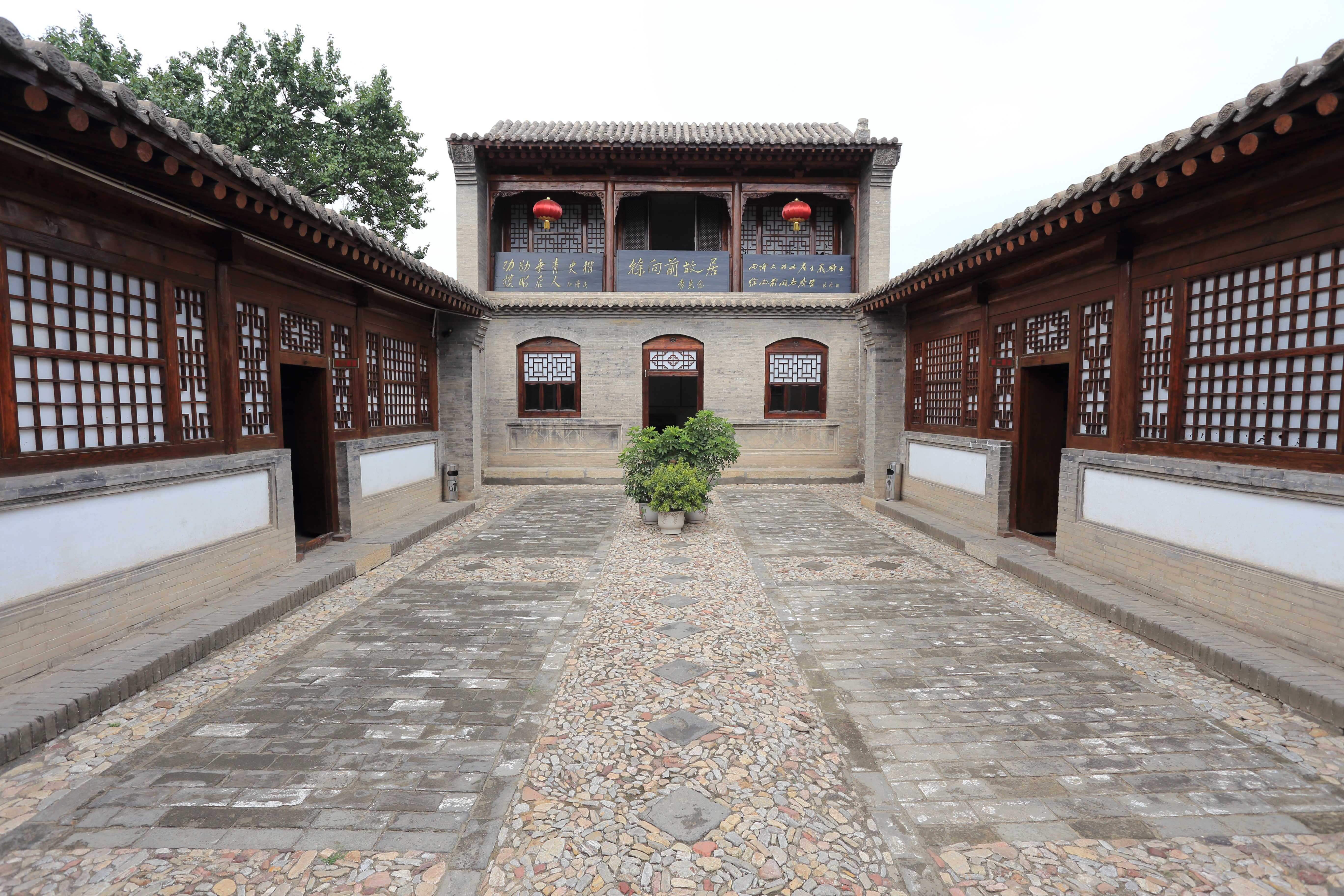 五台县东冶镇徐向前故居—— 后院